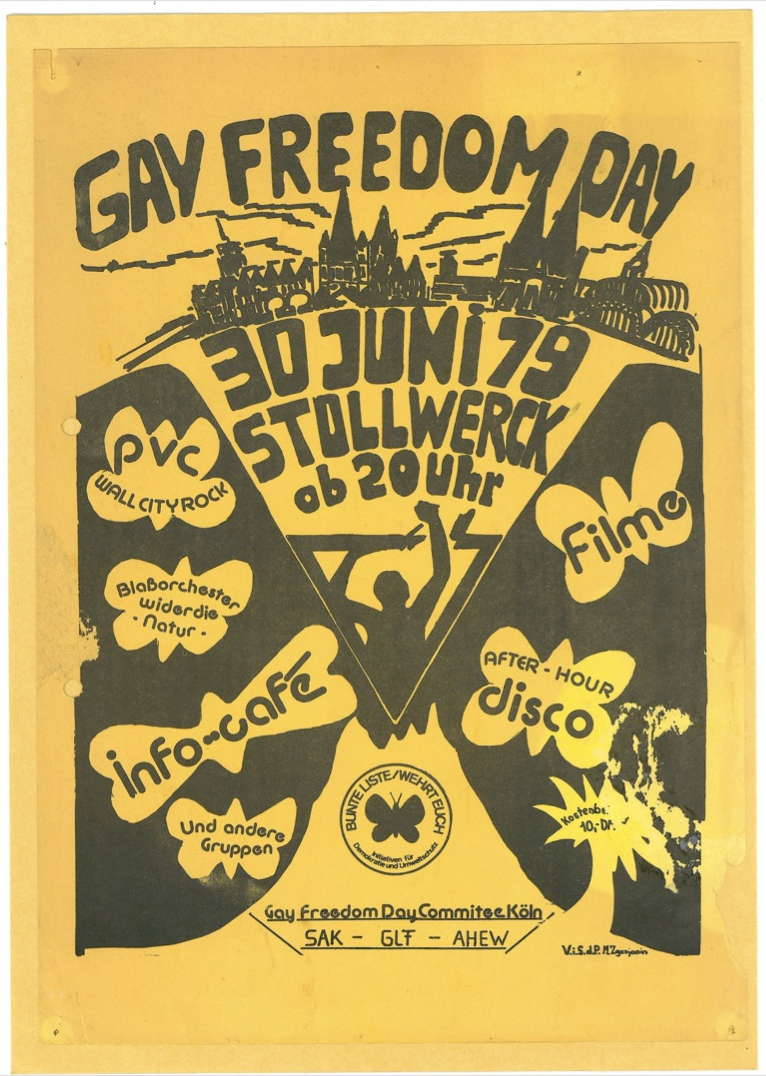 CSD Aushang in Köln 1979 (Archiv: Centrum Schwule Geschichte e.V., Köln)